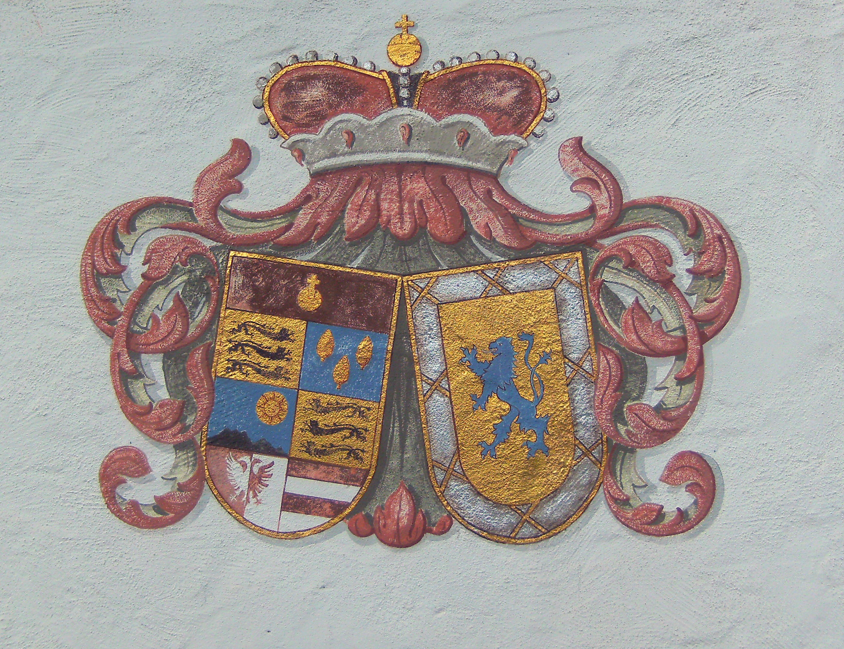 Aitracher Höhenweg - Wappen am Forsthaus nahe der ehem. Kapelle St. Johann im Wald; Allianzwappen Waldburg-Zeil-Trauchburg und ?